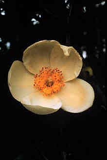 Gordonia lasianthus